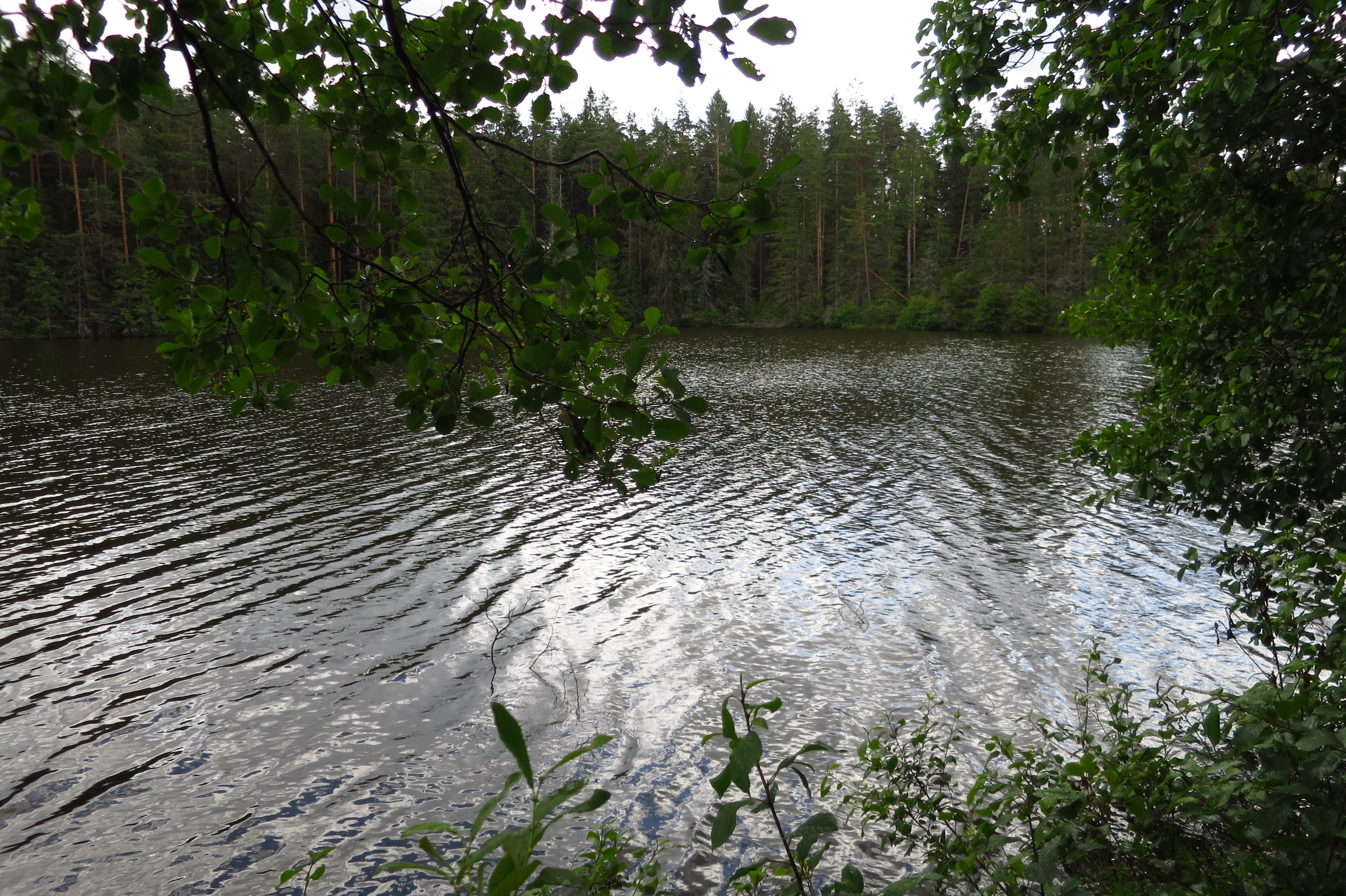 Kanepi Palojärv